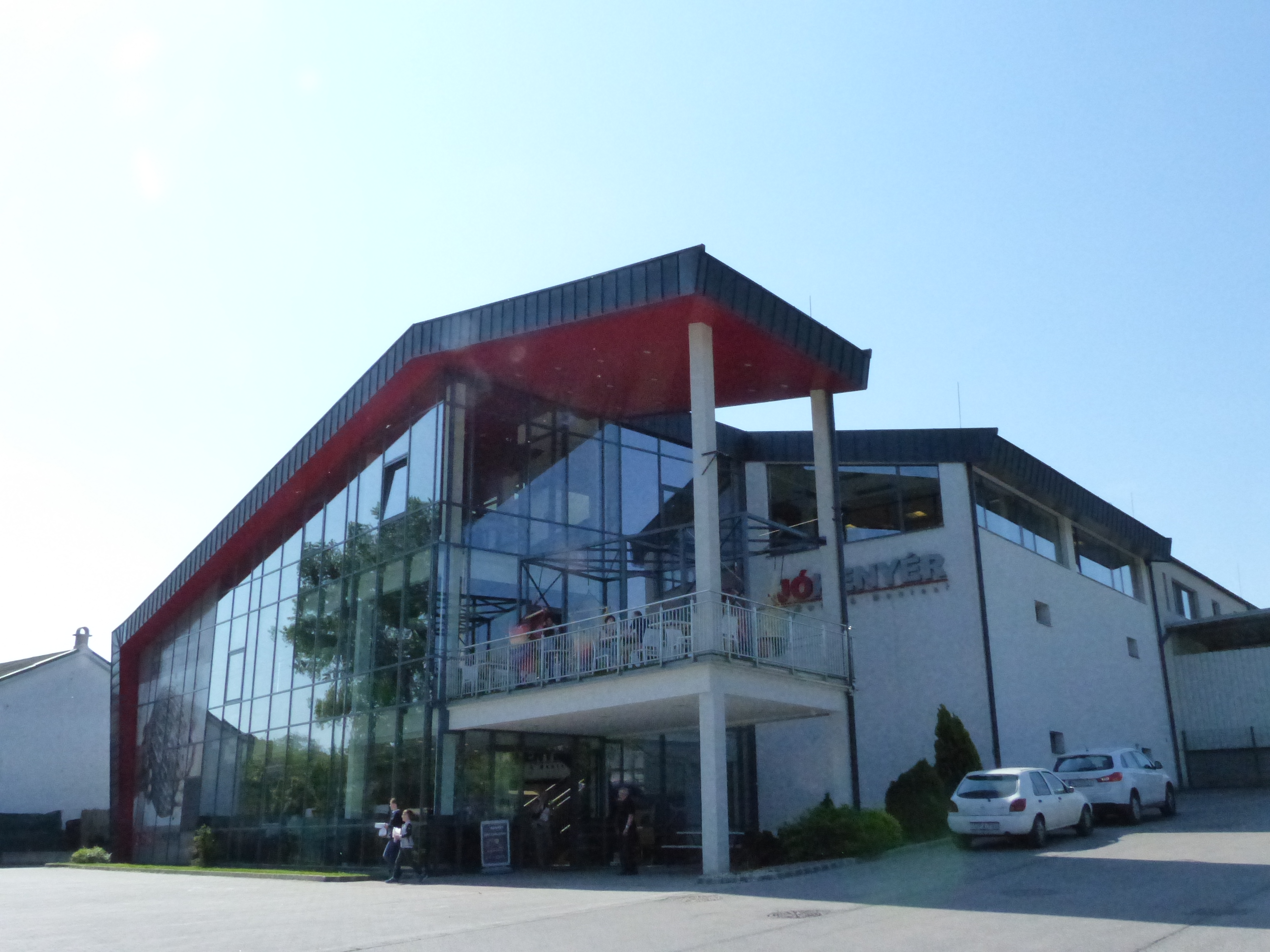 Jókenyér. Pilisszentiván. A felvétel 2017. május 20-án, szombaton készült Pilisszentivánon.